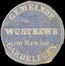 Sealing stamp Title: Gemeinde Wustrewe Description: im Kreis Gardelegen, blau, weiß Place: Wustrewe size: 3 cm